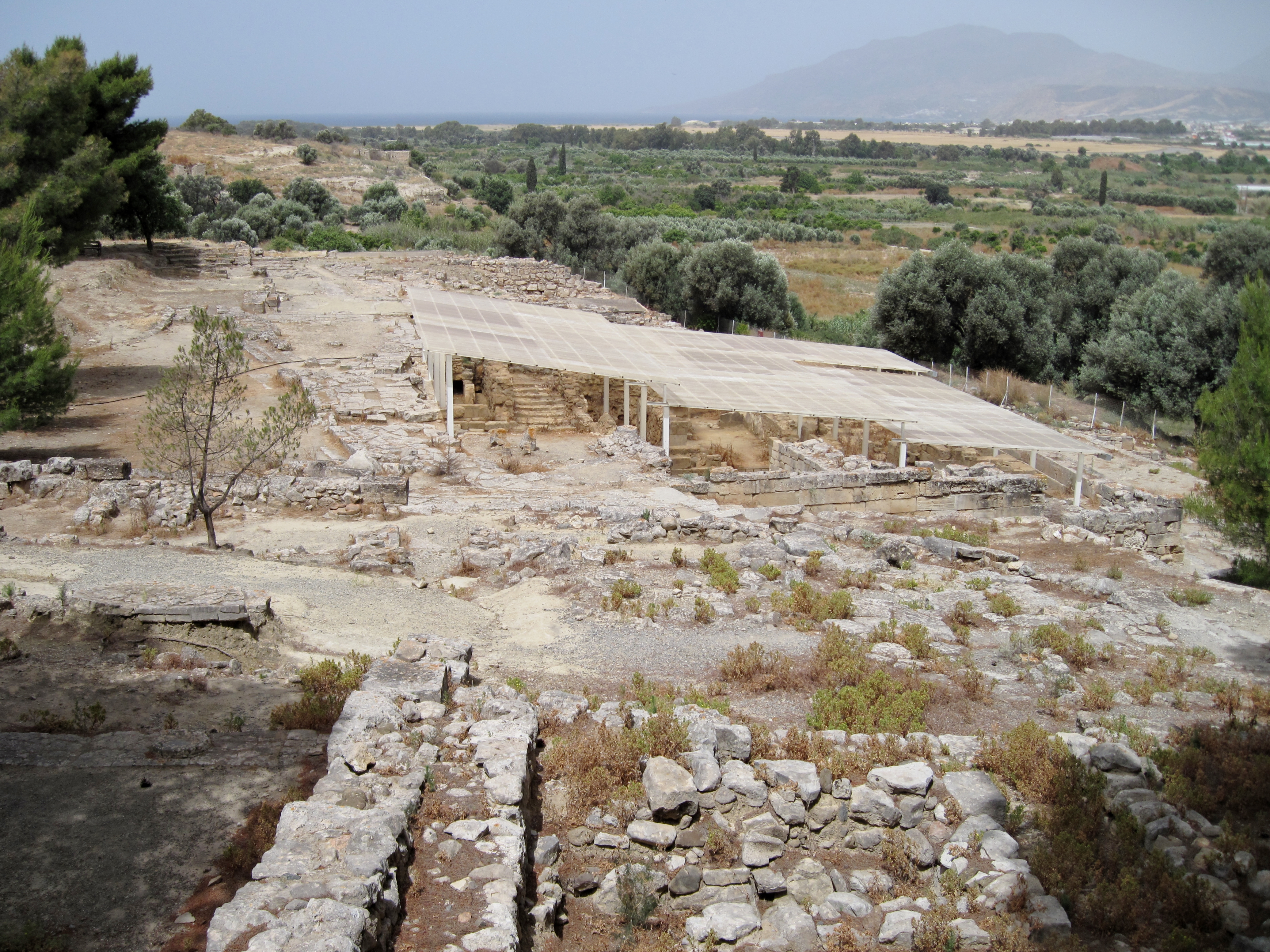 Ausgrabungsstätte von Agia Triada in der Gemeinde Festos, Regionalbezirk Iraklio, Kreta, Griechenland